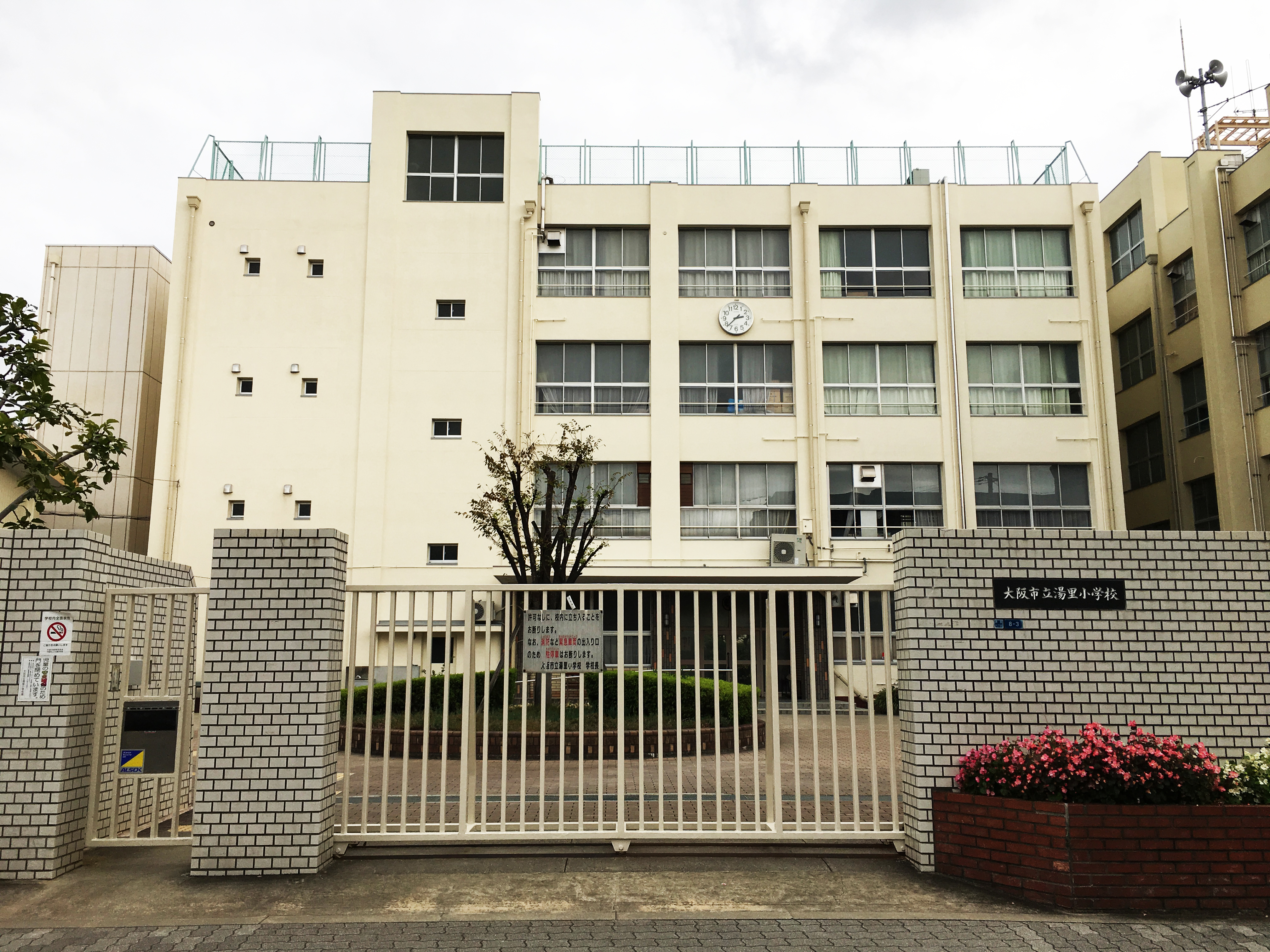 湯里小学校